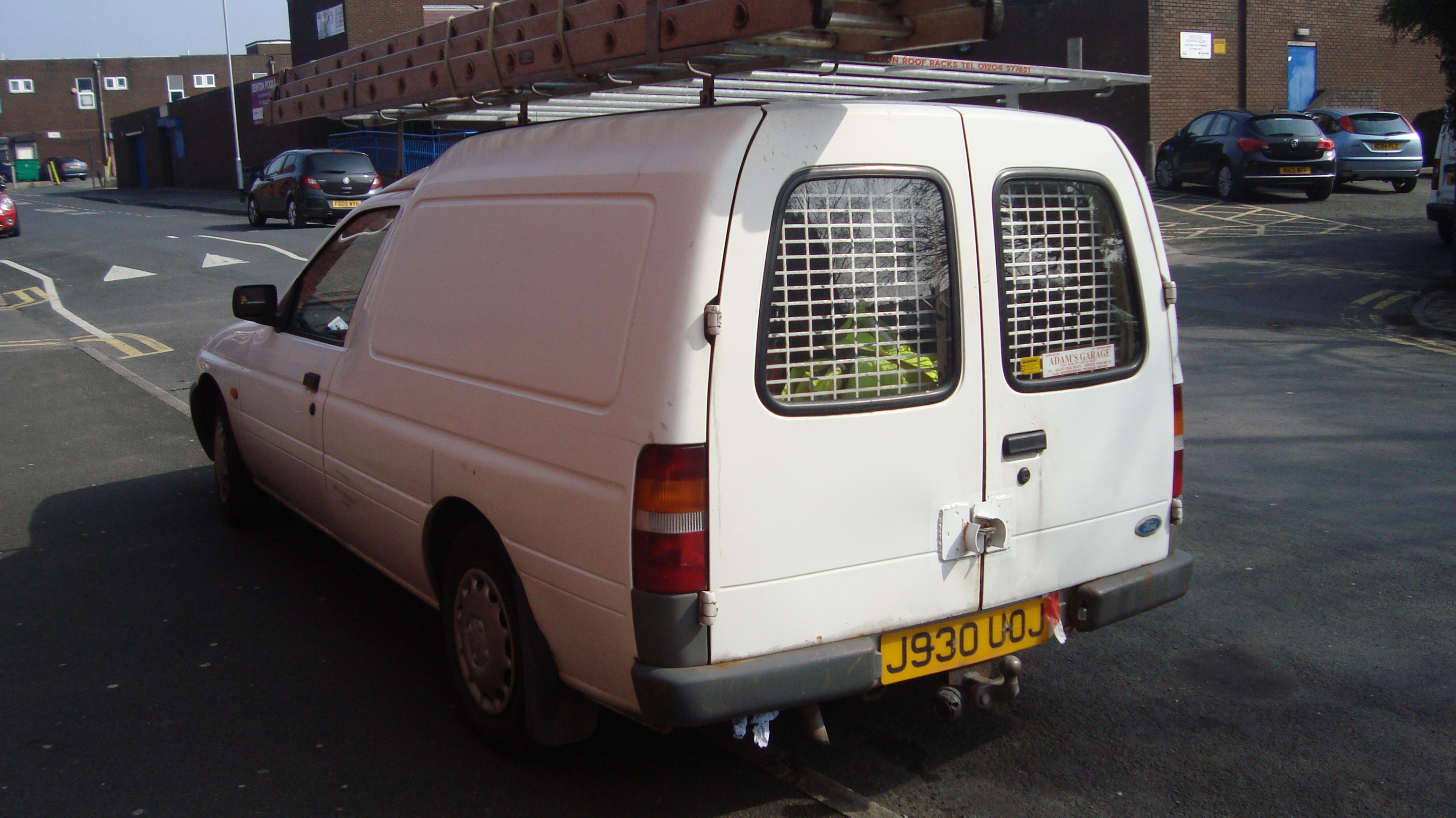 1992 Ford Escort Diesel